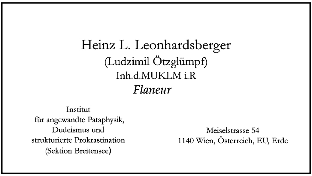 Visitenkarte